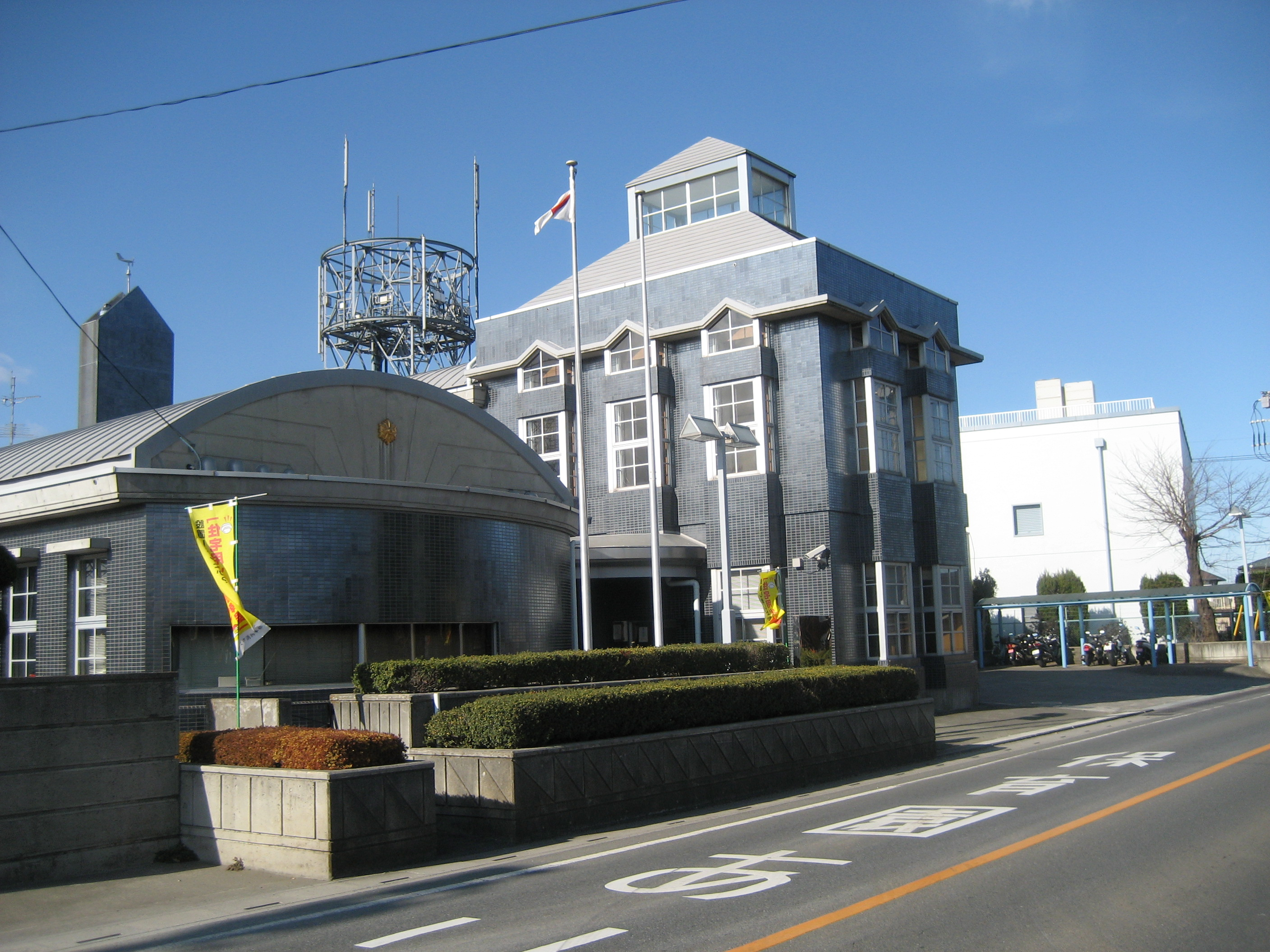 所沢市消防本部中央消防署西分署庁舎